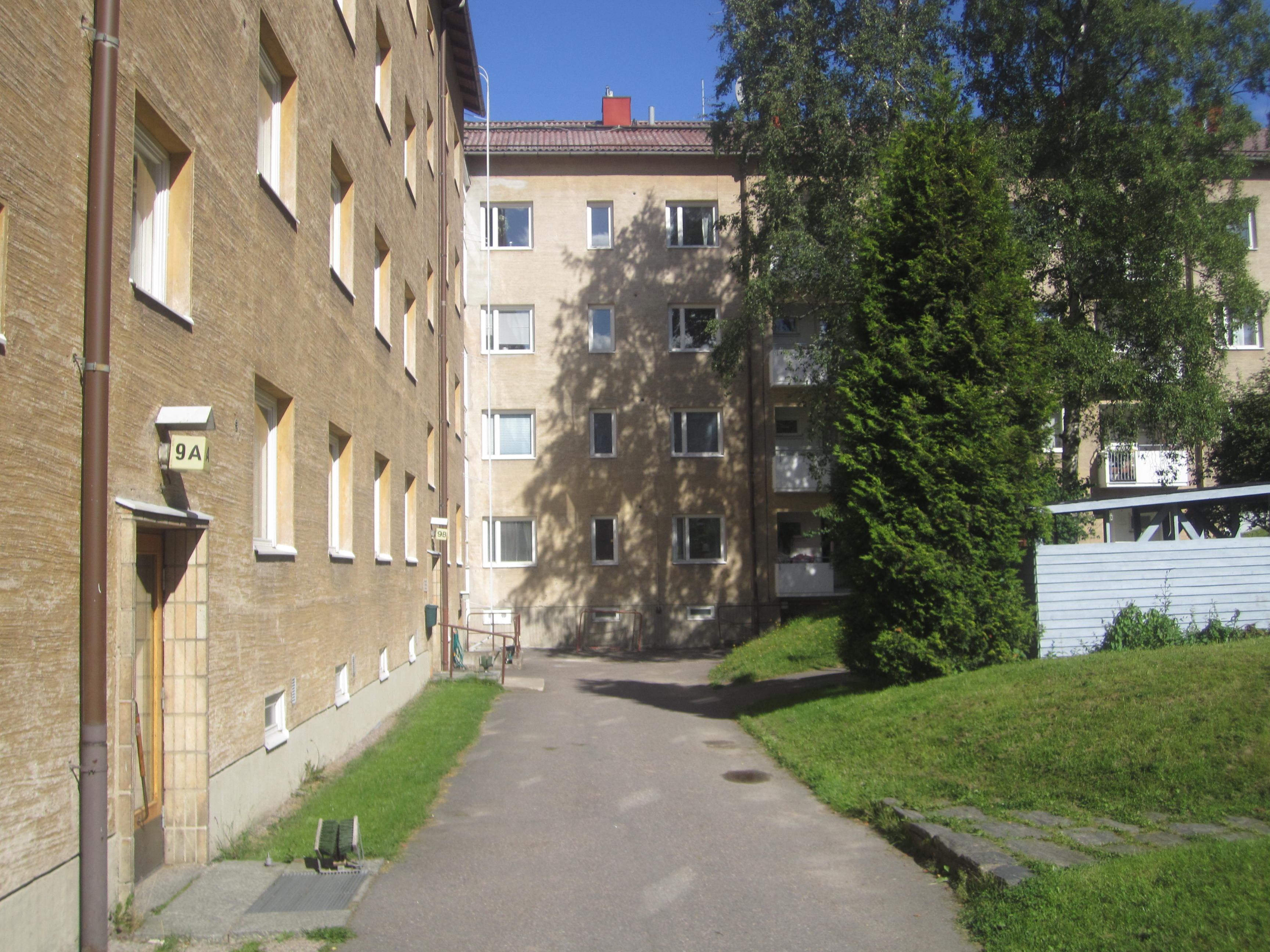 Sofianlehdonkatu 9 Helsingin Käpylässä.